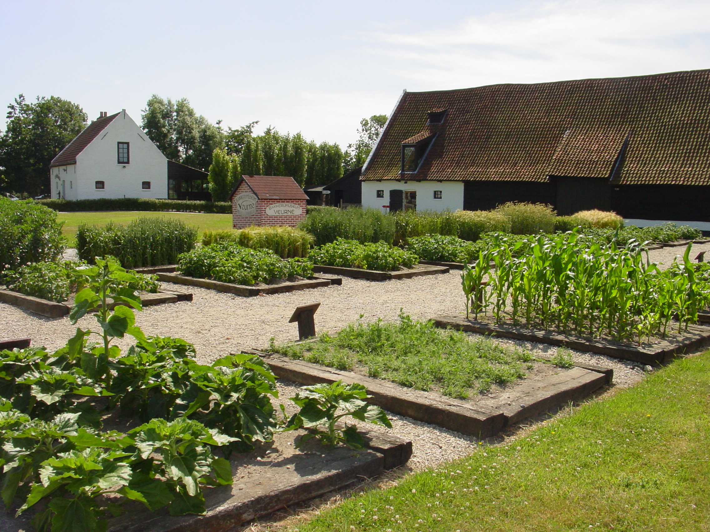 Het domein van het Bakkerijmuseum Veurne